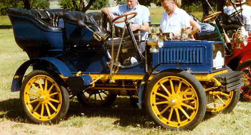 Pope-Toledo Tonneau 1904